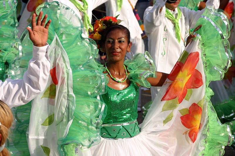 Desfile de Fandango - Fiestas patronales del Dulce nombre de Jesús o Fiestas del 20 de enero. Sincelejo, Sucre, Colombia.